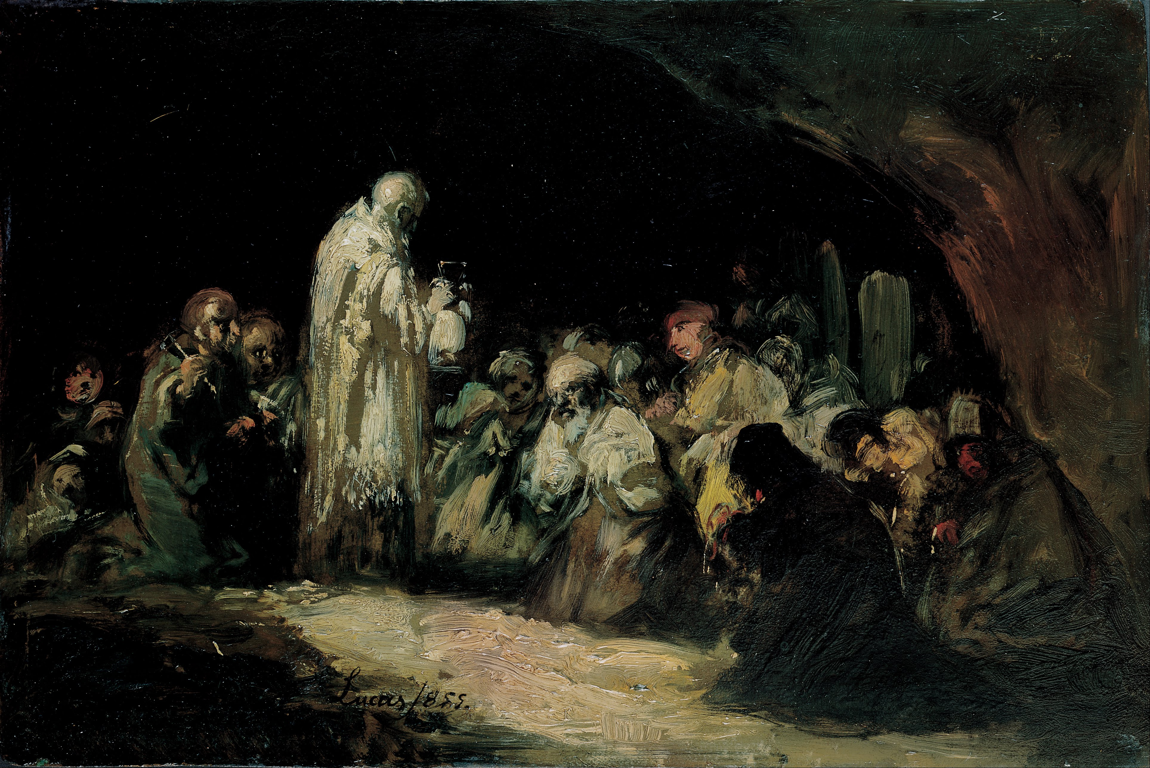 El lienzo muestra a un sacerdote repartiendo la Comunión entre un grupo de cristianos.